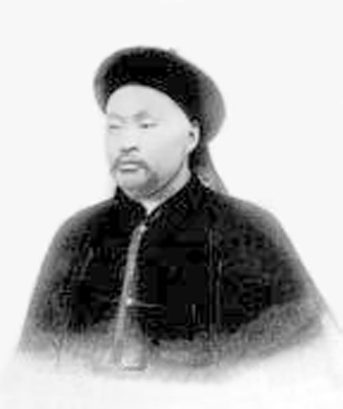 恒龄，清朝官员